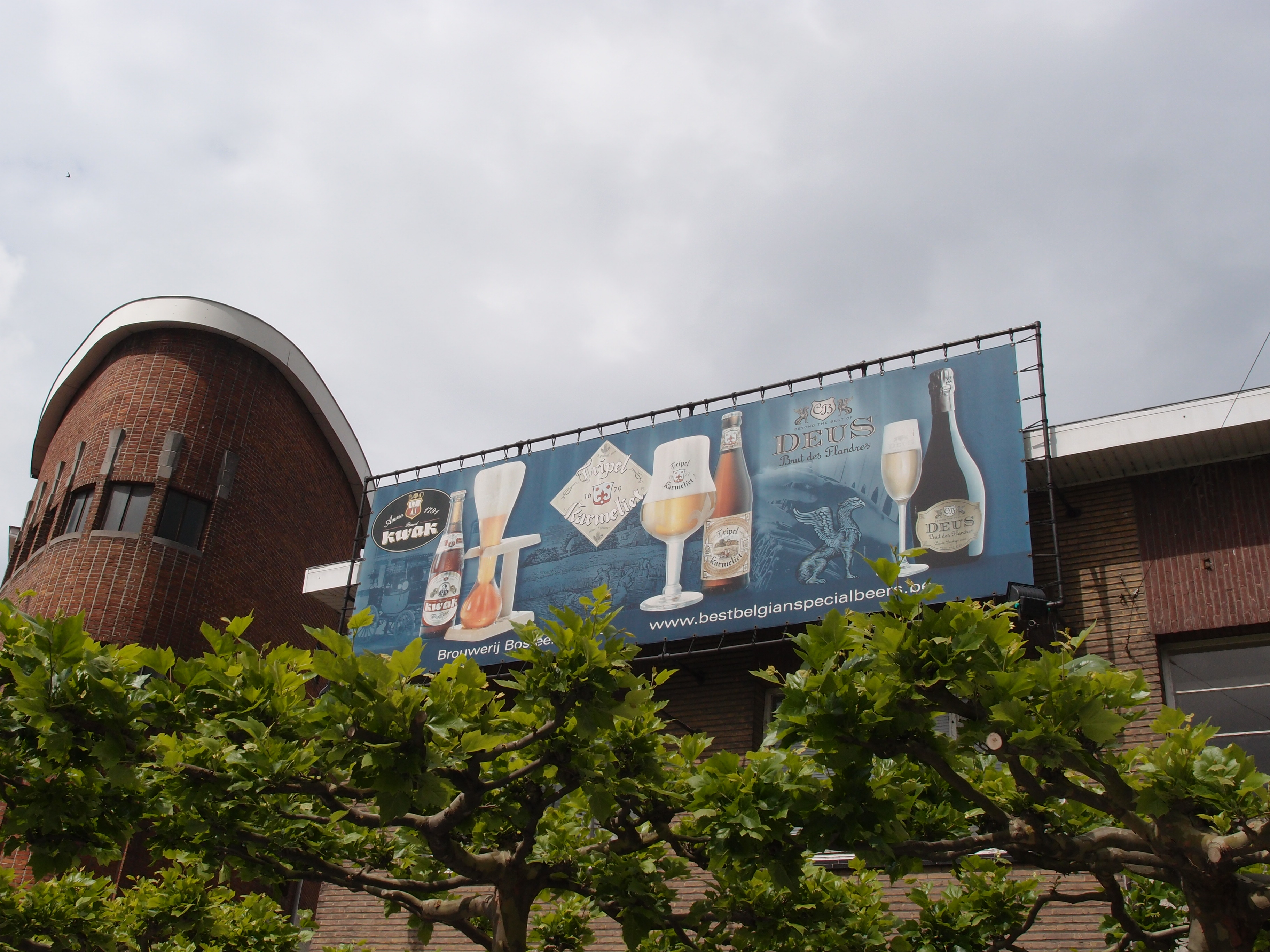 Außenwerbung an der belg. Familienbrauerei Bosteels in Buggenhout Datum: 29.05.2014 Urheber: M. Pfeiffer alias Benutzer:Gordito1869 Quelle: Privates Fotoarchiv des Urhebers